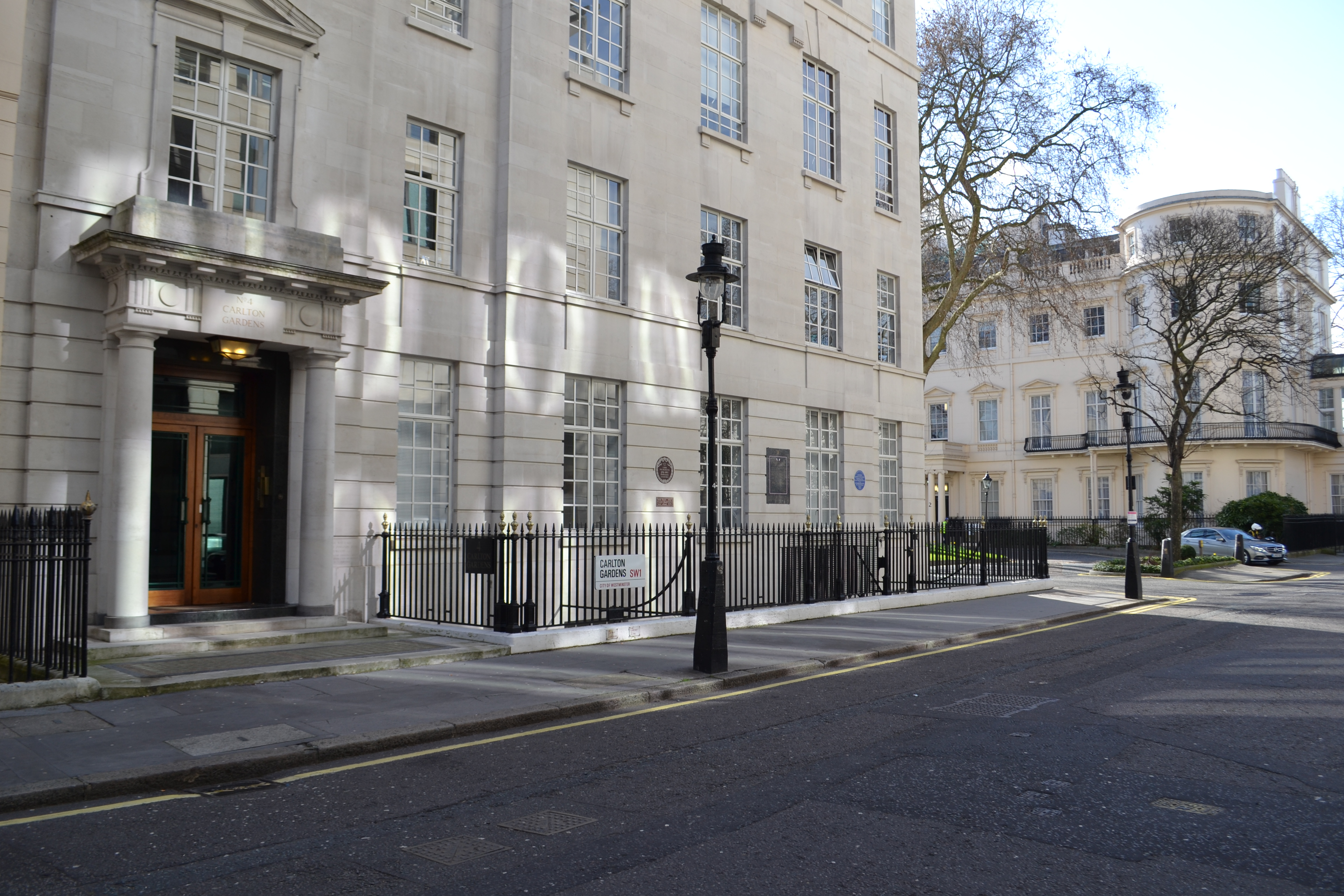 N° 4 de Carlton Gardens, Londres, où le général de Gaulle installa le QG des Forces françaises libres en 1940.